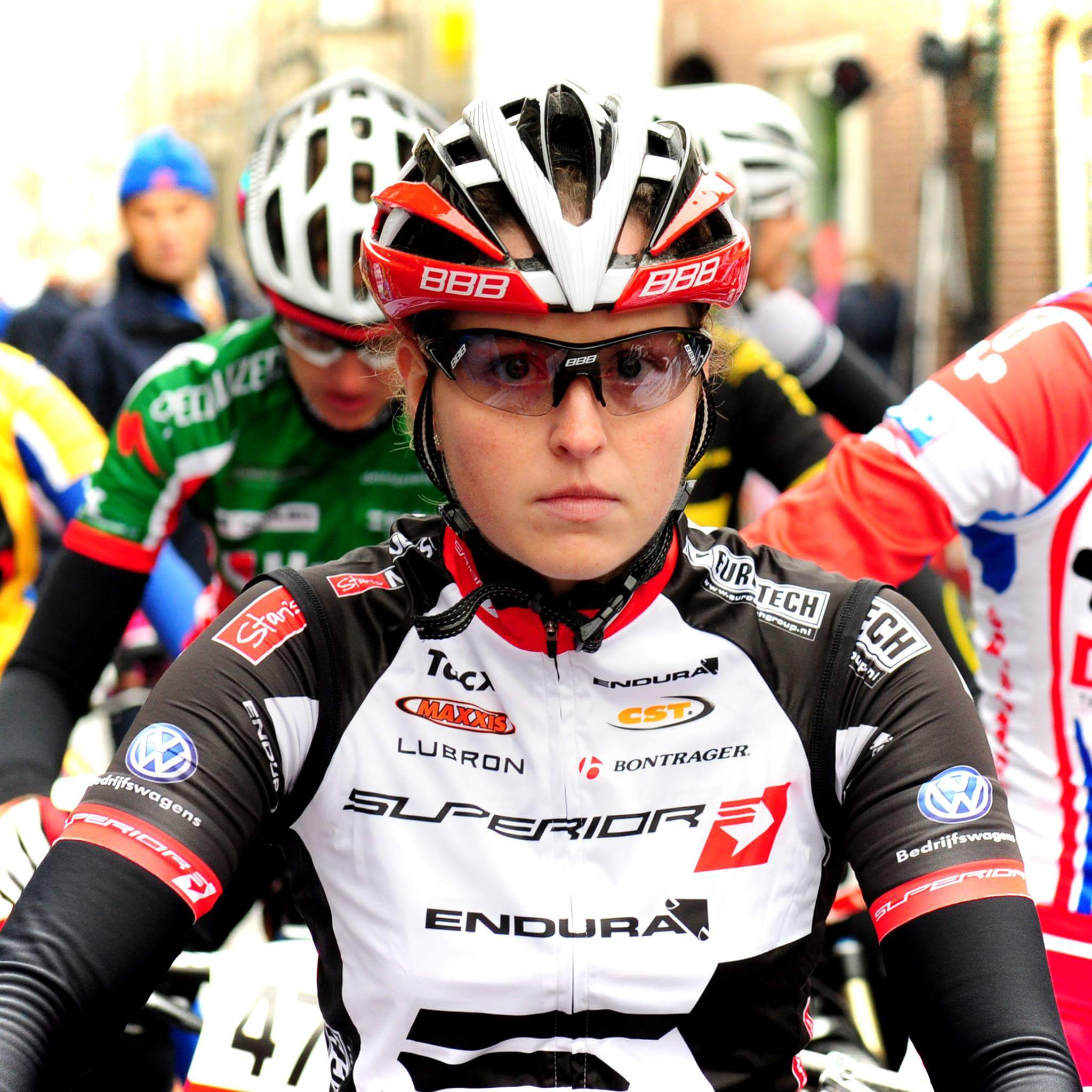 Start Bart Brentjens Challenge